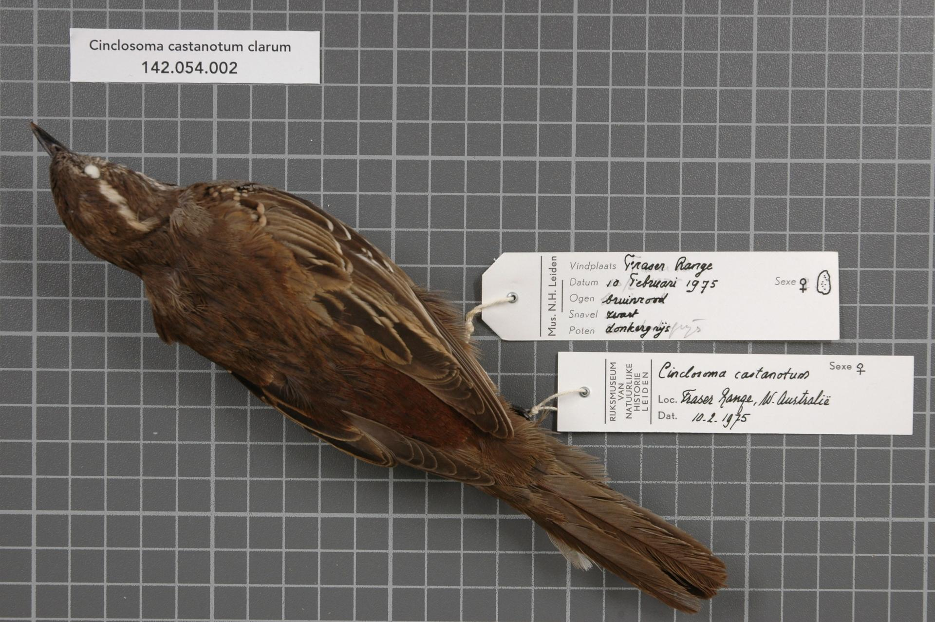 Cinclosoma castanotum clarum Morgan, 1926